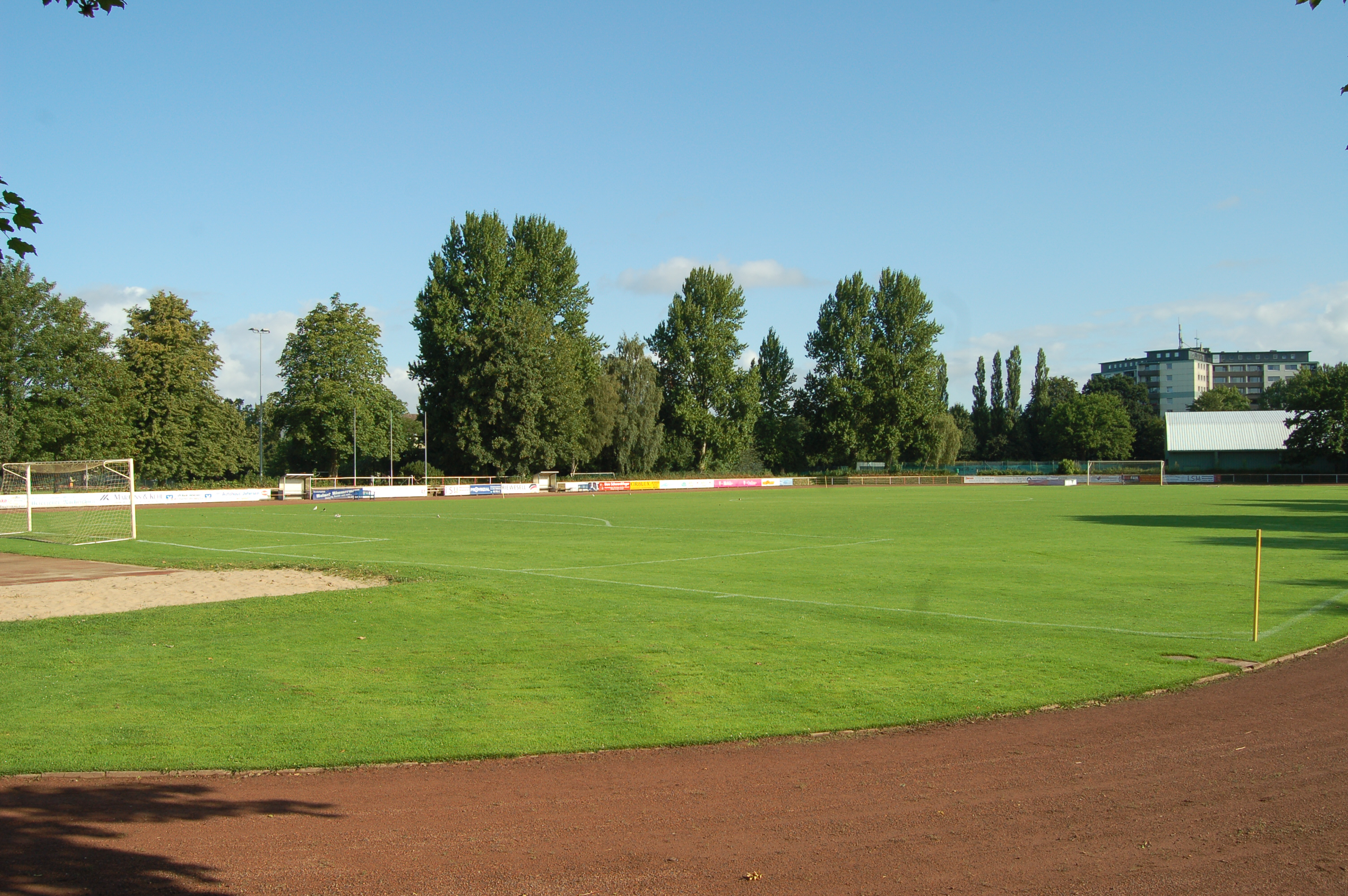 Das Hauptspielfeld des "Rosenstadion" in Uetersen. Das Rosenstadion besitzt insgesamt vier Spielfelder und eine Turnhalle.